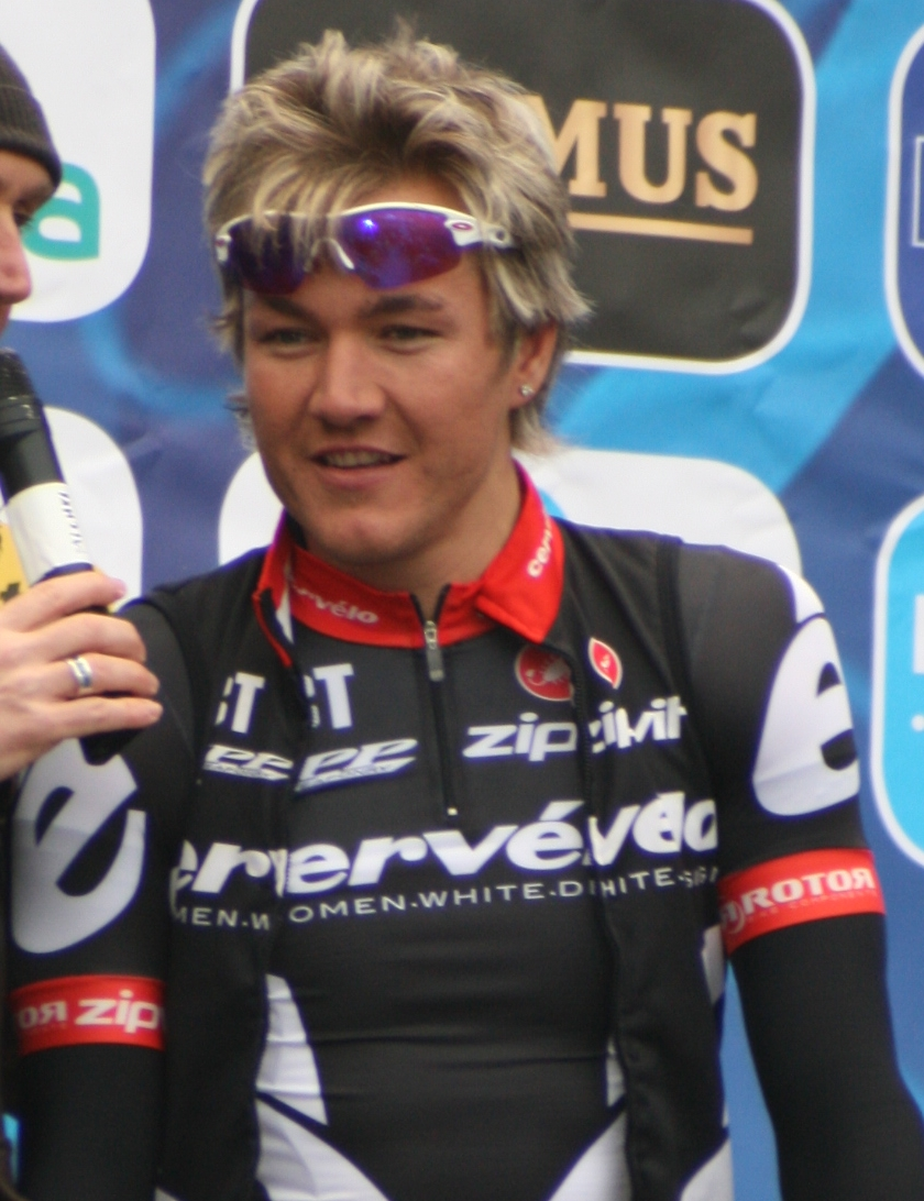 Heinrich Haussler au départ du Tour des Flandres 2009